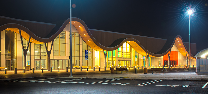 Väla Park, fasad